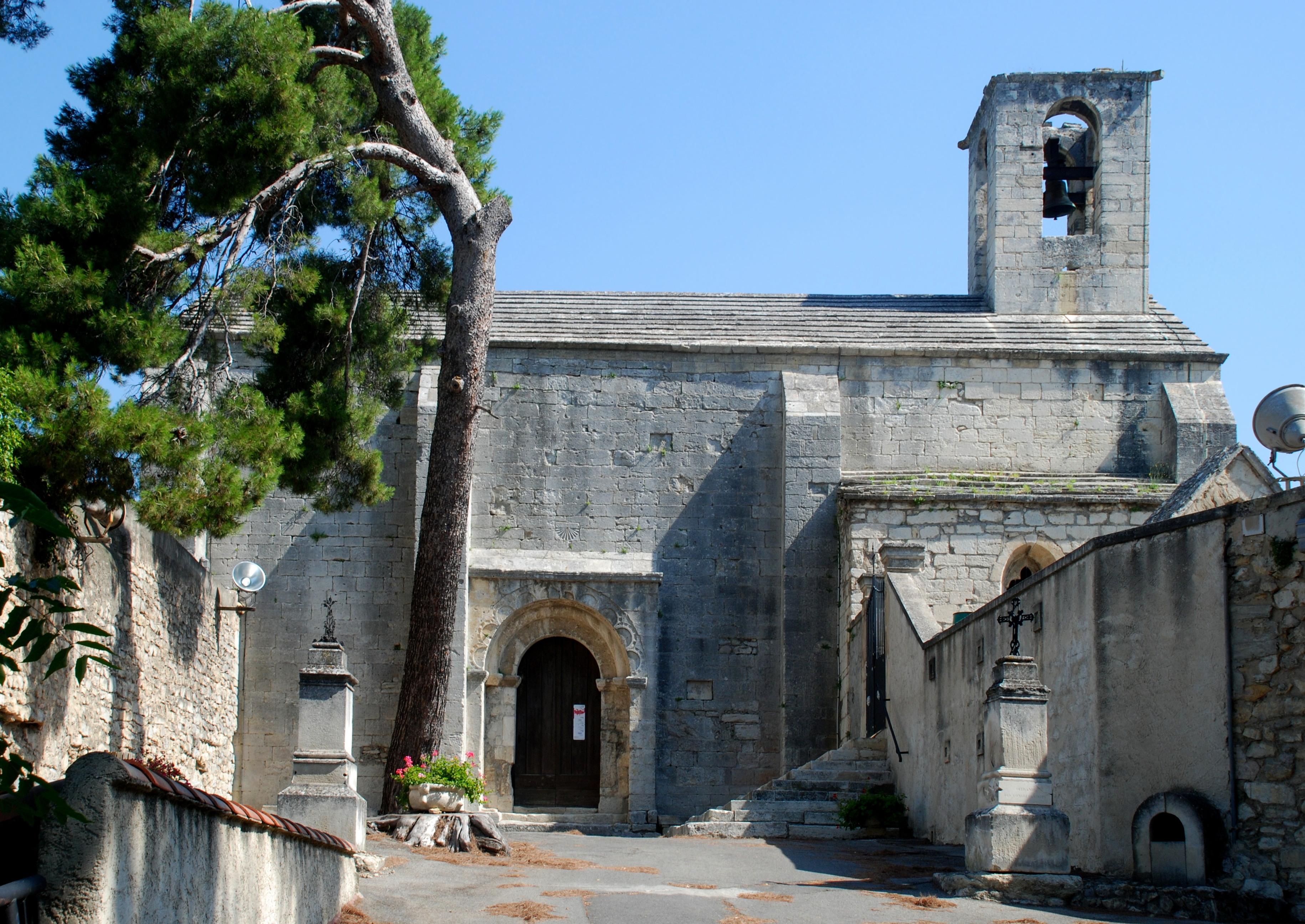 France - Provence - Boulbon - Saint-Marcellin